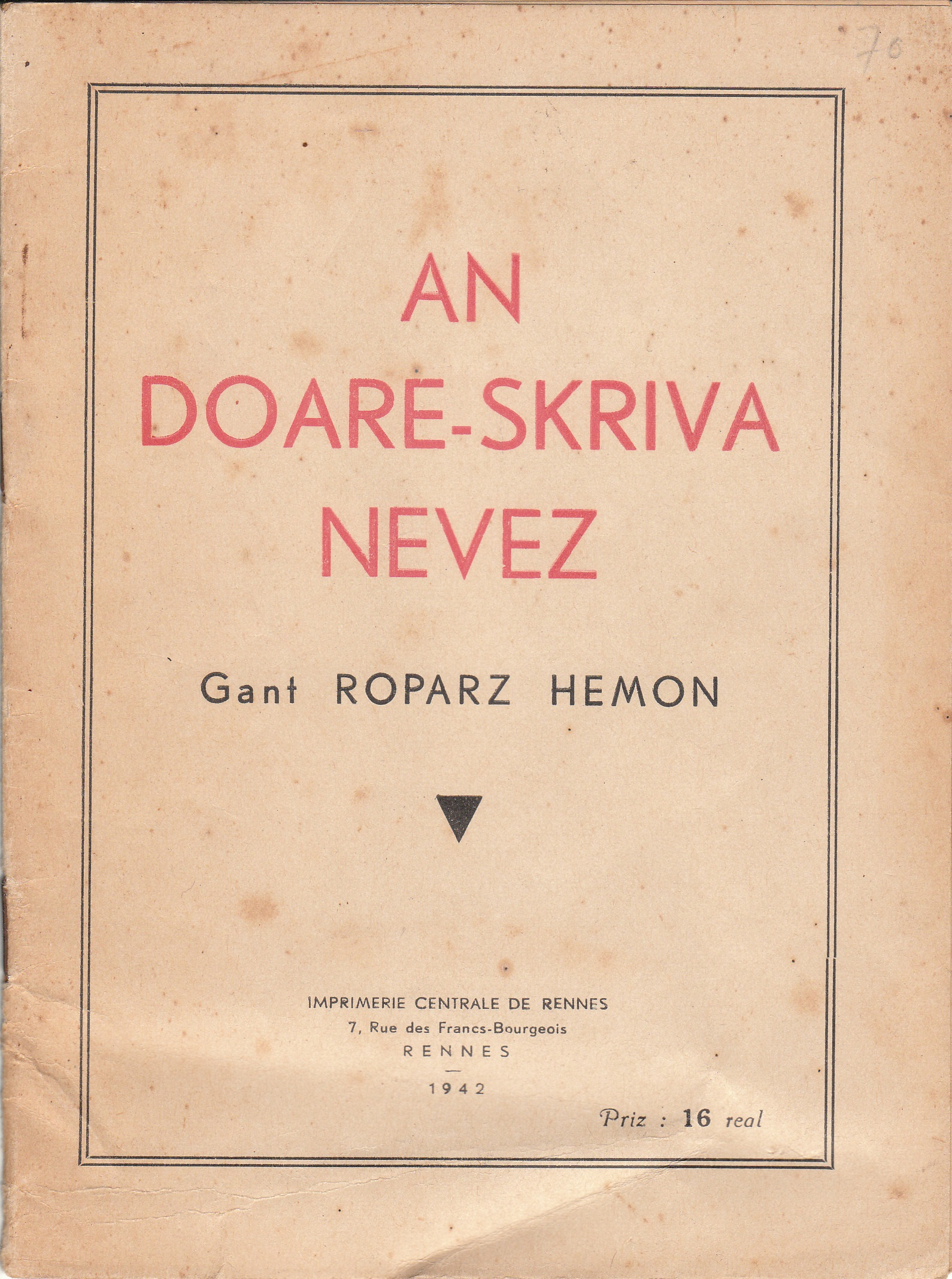 Golo " An doare-skriva vevez", Roparz Hemon, 1942 – Ment 13x18 cm, 22 bajenn – Priz : 16 real.